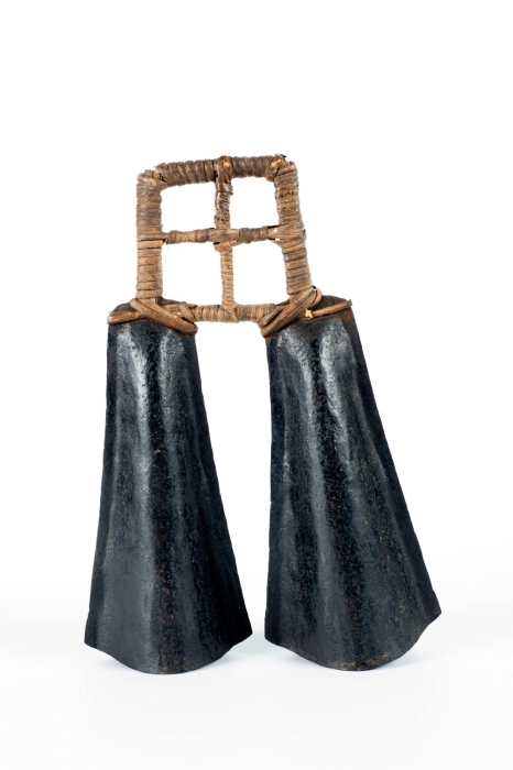 Agogo is een term die bij verschillende Nigeriaanse bevolkingsgroepen (de Yoruba-, Igala- en Edo sprekende groepen) wordt gebruikt voor een geslagen klepelloze klok. Deze dubbele klok zonder klepel wordt in de hand gehouden met de open kant naar boven, en extern aangeslagen met een (ijzeren) stok (deze ontbreekt hier). De klokken zijn aan elkaar verbonden door middel van een beugel/handvat die met rotanrepen omwoeld is. Het instrument wordt gebruikt om - in een ensemble met verschillende trommen samen- ritme aan te geven bij dansen en ceremonies van uiteenlopende aard. Het wordt ook als signaalinstrument gebruikt. Daarnaast is het een attribuut van hoogwaardigheidsbekleders, zoals bij de Sultan van Foumban. De Igala maken onderscheid tussen een agogo en de grotere ceremoniële enu. De agogo wordt door heb gebruikt ter begeleiding van zang en dans. De enu daarentegen, waarvan verschillende afmetingen in serie samen worden bespeeld, wordt louter ceremonieel gebruikt. De verschillende klokken hebben verschillende benamingen en rangen en worden bewaard in voorouder heiligdommen. De agogo werd door Afrikaanse slaven meegenomen naar Noord- en Zuid Amerika. In Brazilië wordt de agogo gebruikt in Afro-Braziliaanse religieuze rituelen van de Candomblé. In Cuba wordt de agogo bespeeld in rituelen van de Lucumi cultus. Het instrument heeft daar de vorm aangenomen van een schoffel waartegen bijvoorbeeld met een grote spijker wordt geslagen.